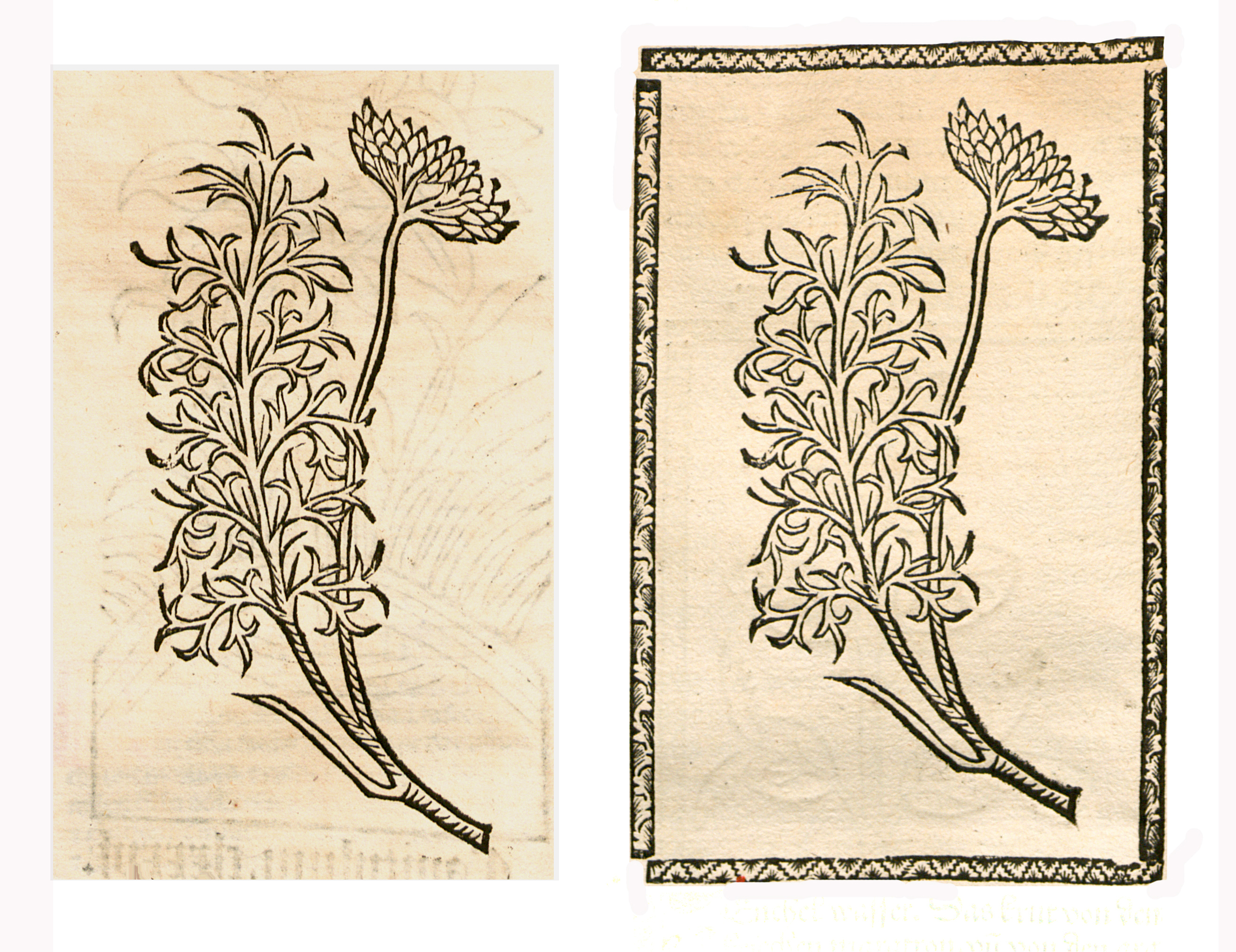 Abbildung von: Foeniculum vulgare